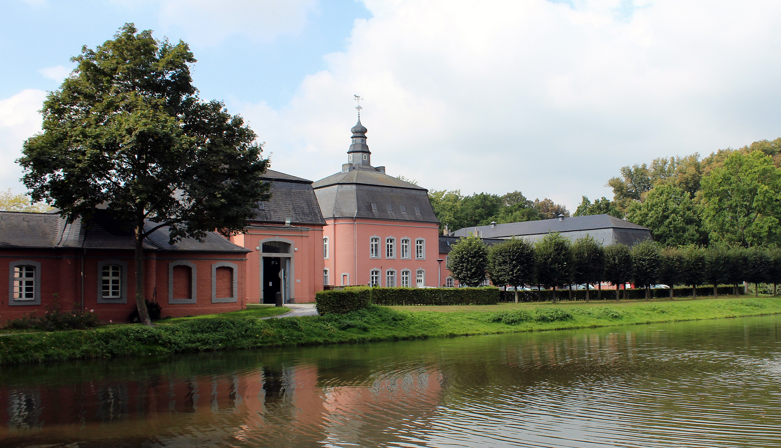 Schloss Wickrath Ostflügel mit Schlossgraben